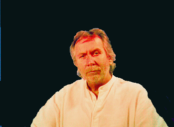 Portrait d'Bernar Venet.